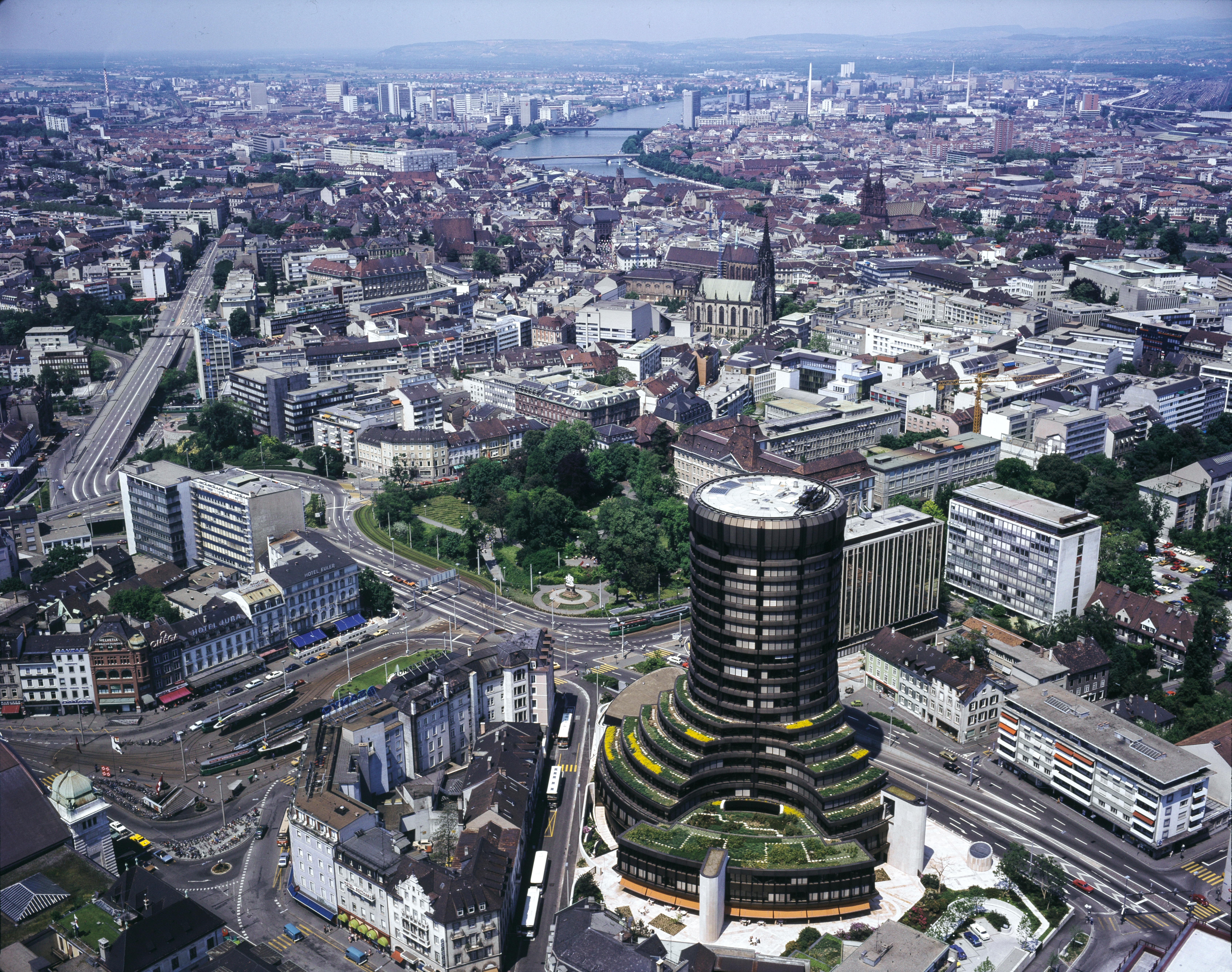 Basel: Luftbild von Südosten mit BIZ-Turm der Basler Altstadt mit Rheinknie